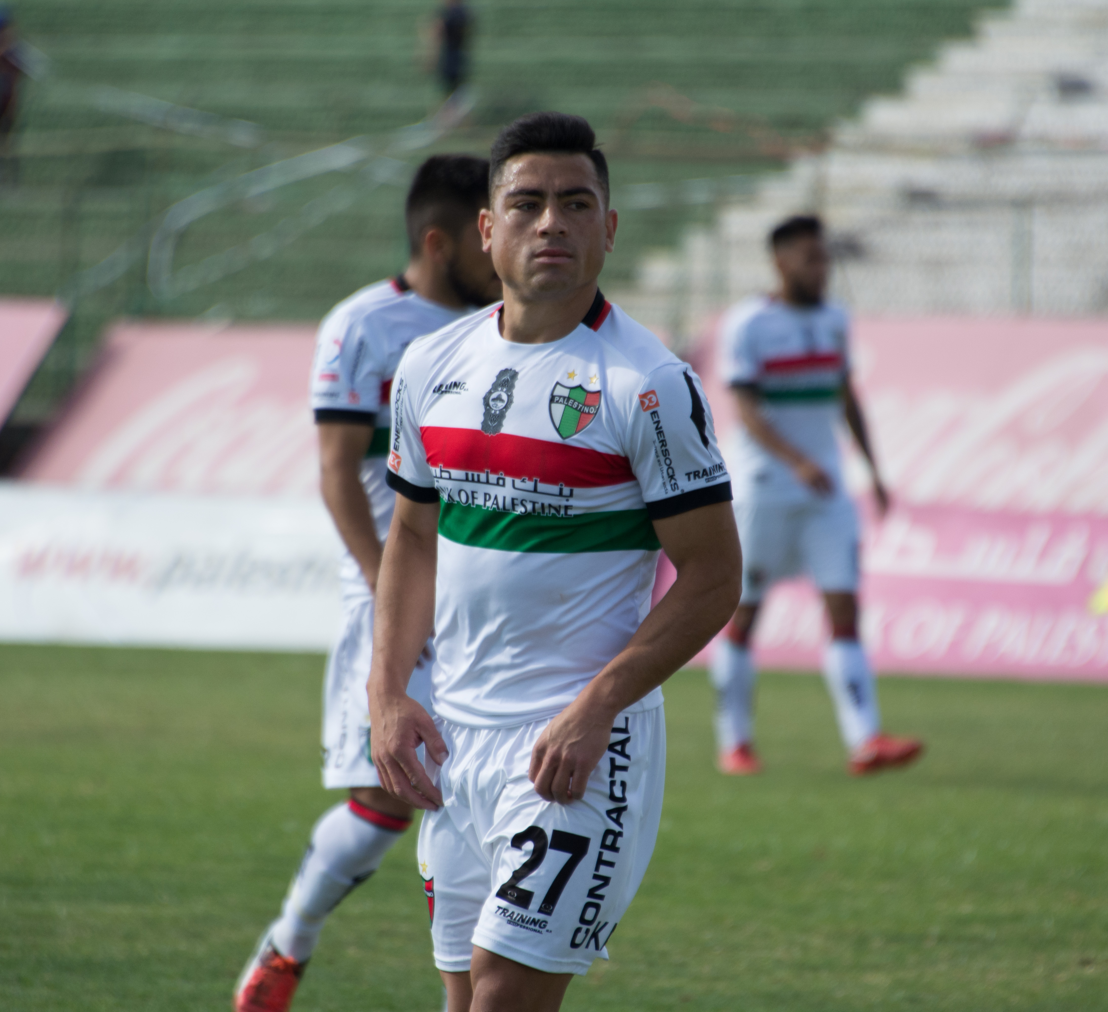 Diego Vallejos, Palestino v Universidad de Concepción, Estadio Municipal de La Cisterna, La Cisterna, Santiago, Chile.